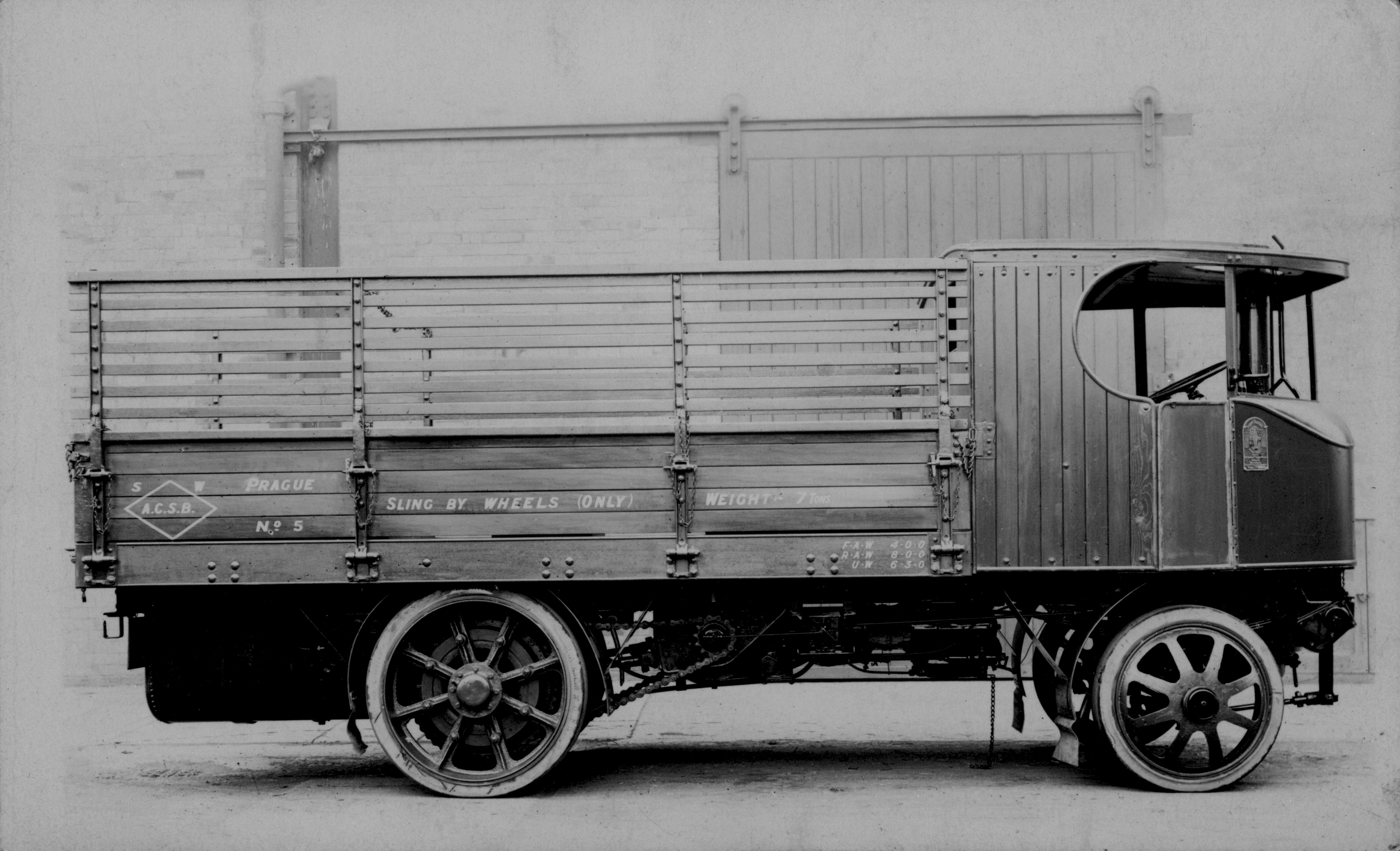 parní Sentinel v Československu zakoupený v Anglii krátce po 1. světové válce pro vyškovský pivovar v roce 1924. (Vyškov- czech republic)